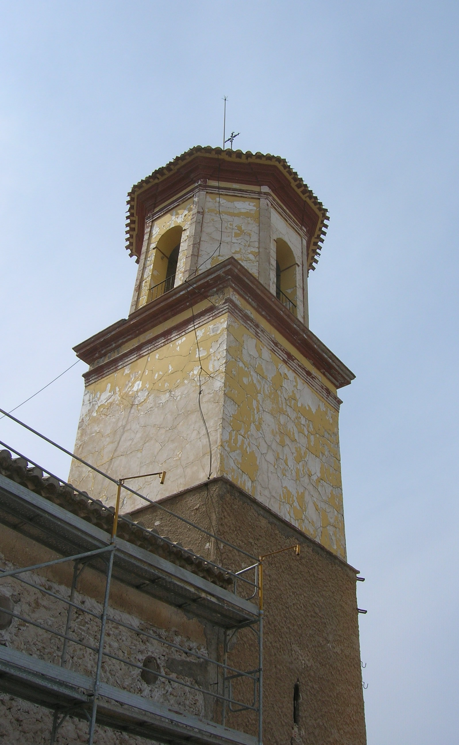 Campanar de la iglesia de los Santos, o ermita de los Santos, en Calasparra, Murcia, España. La iglesia está en proceso de restauración, en la fecha de la foto (1 de marzo de 2006). Fotografía propia, cedida al dominio público.